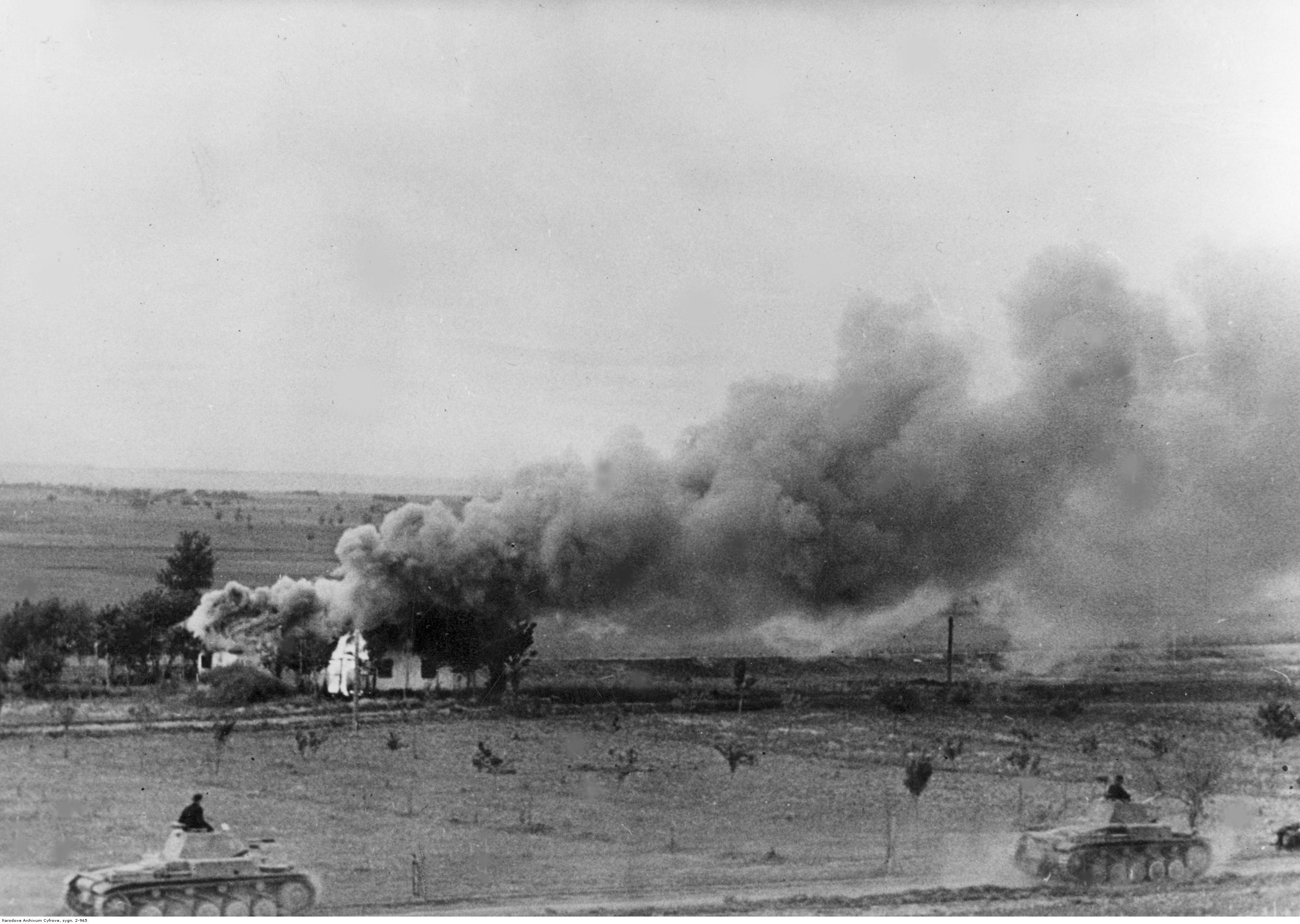 Czołgi niemieckie PzKpfw II w natarciu na froncie wschodnim. Widoczny ostrzelany i płonący dom.